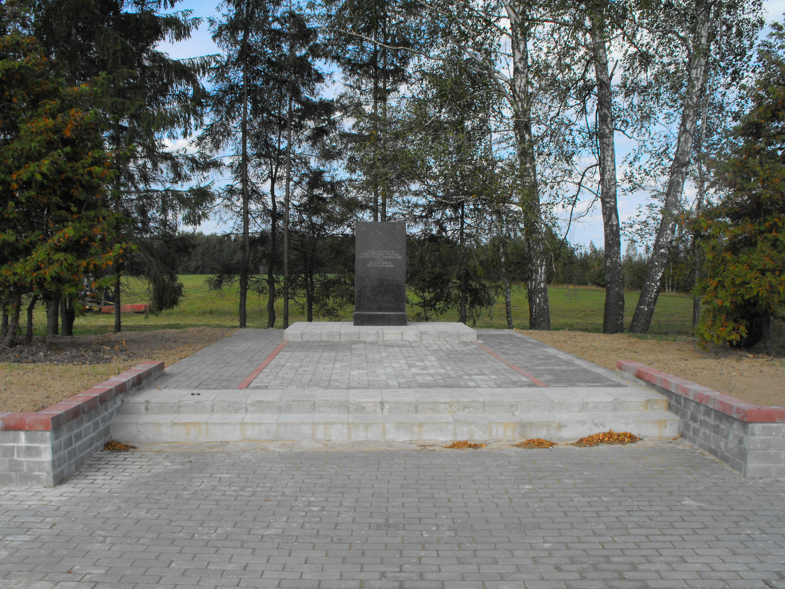 Памятник на месте расстрела в 1942 году 250 березинских евреев. Национальность жертв не упомянута. Находится на обочине трассы Минск-Могилёв между 110 и 111 километрами.